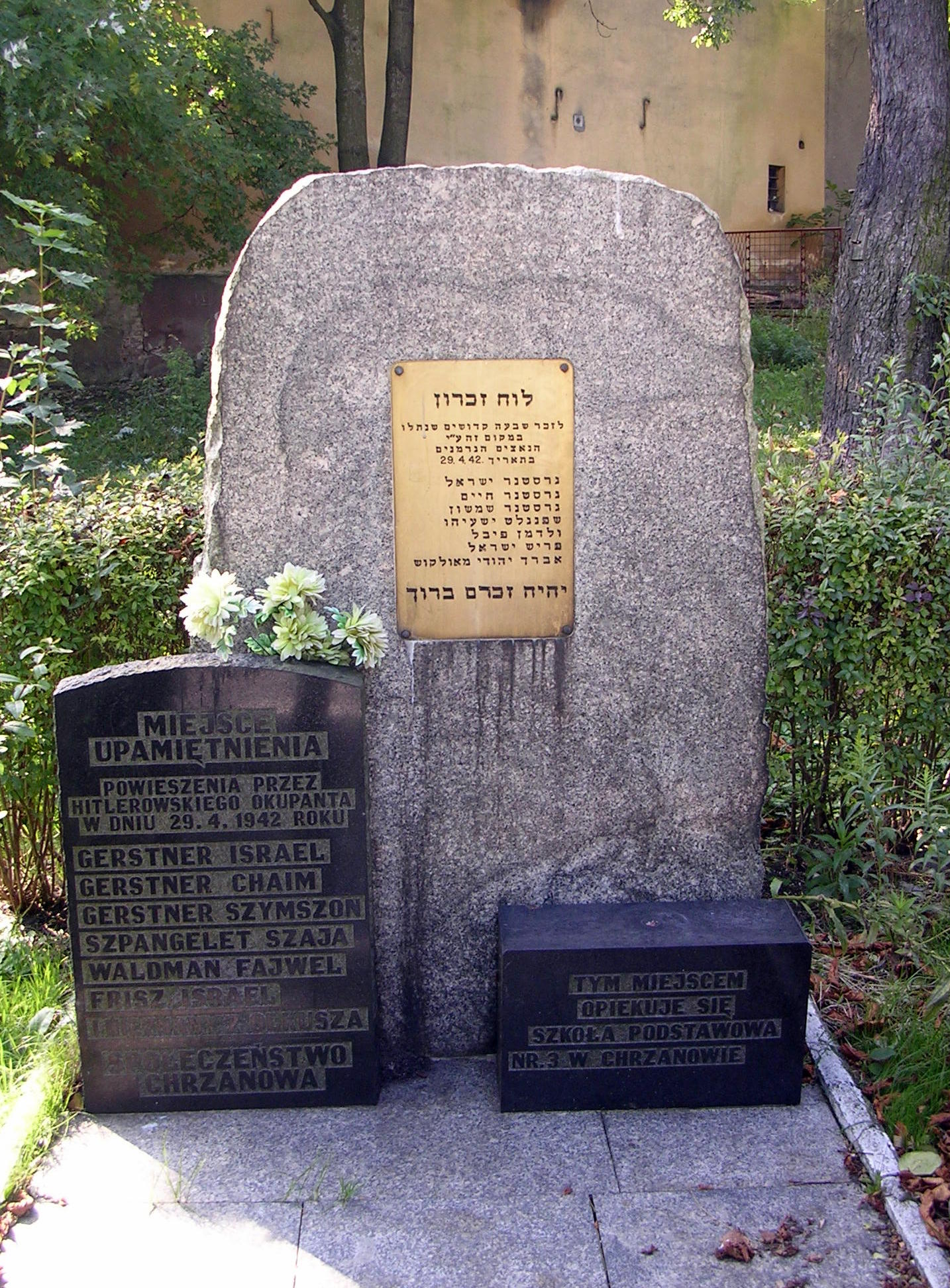 כשאנוב, מצבה לזכר 7 שנתלו על-ידי הגרמנים (צילום = הולנדר 2010)